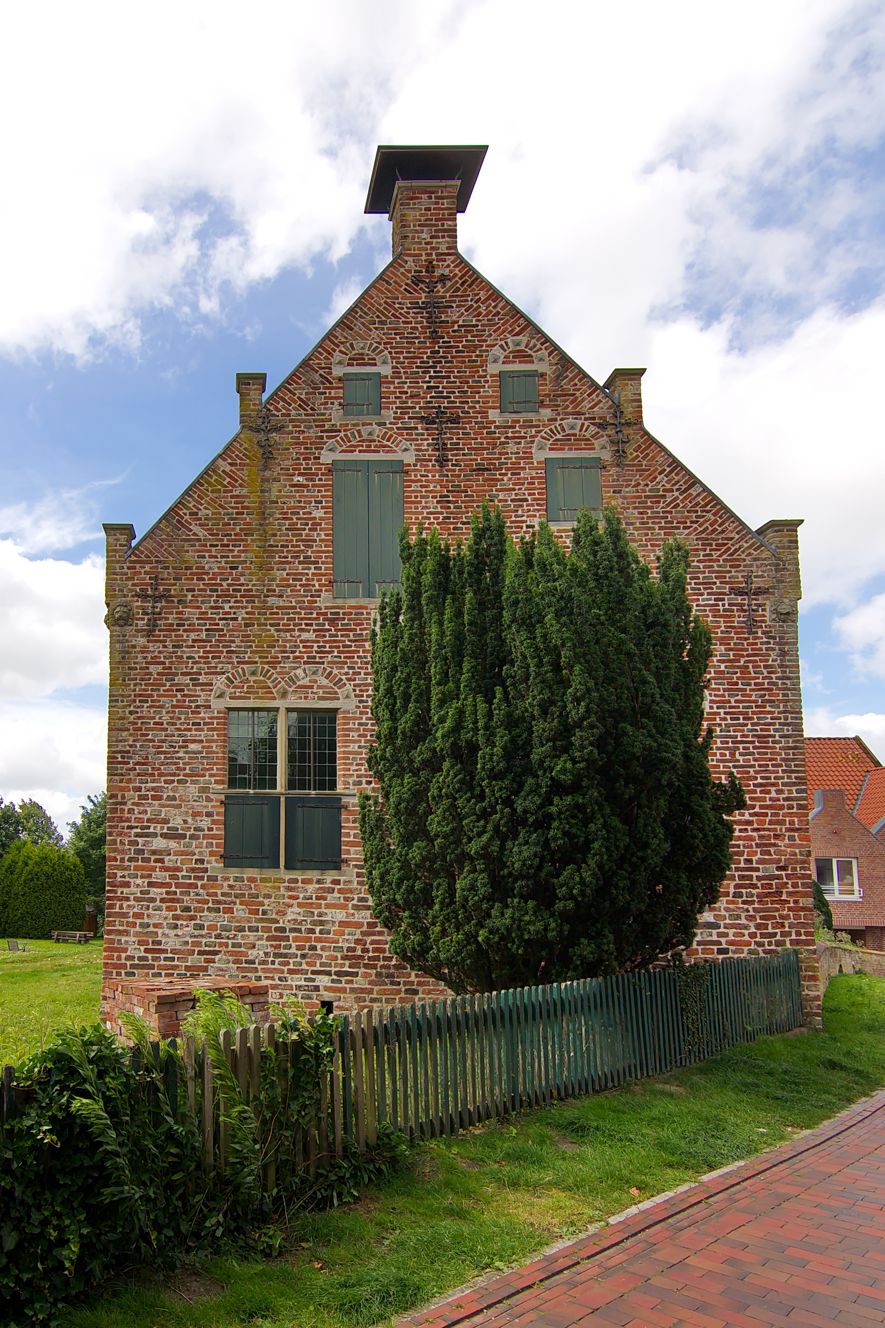 Steinhaus Greetsiel (Krummhörn), Niedersachsen, Deutschland